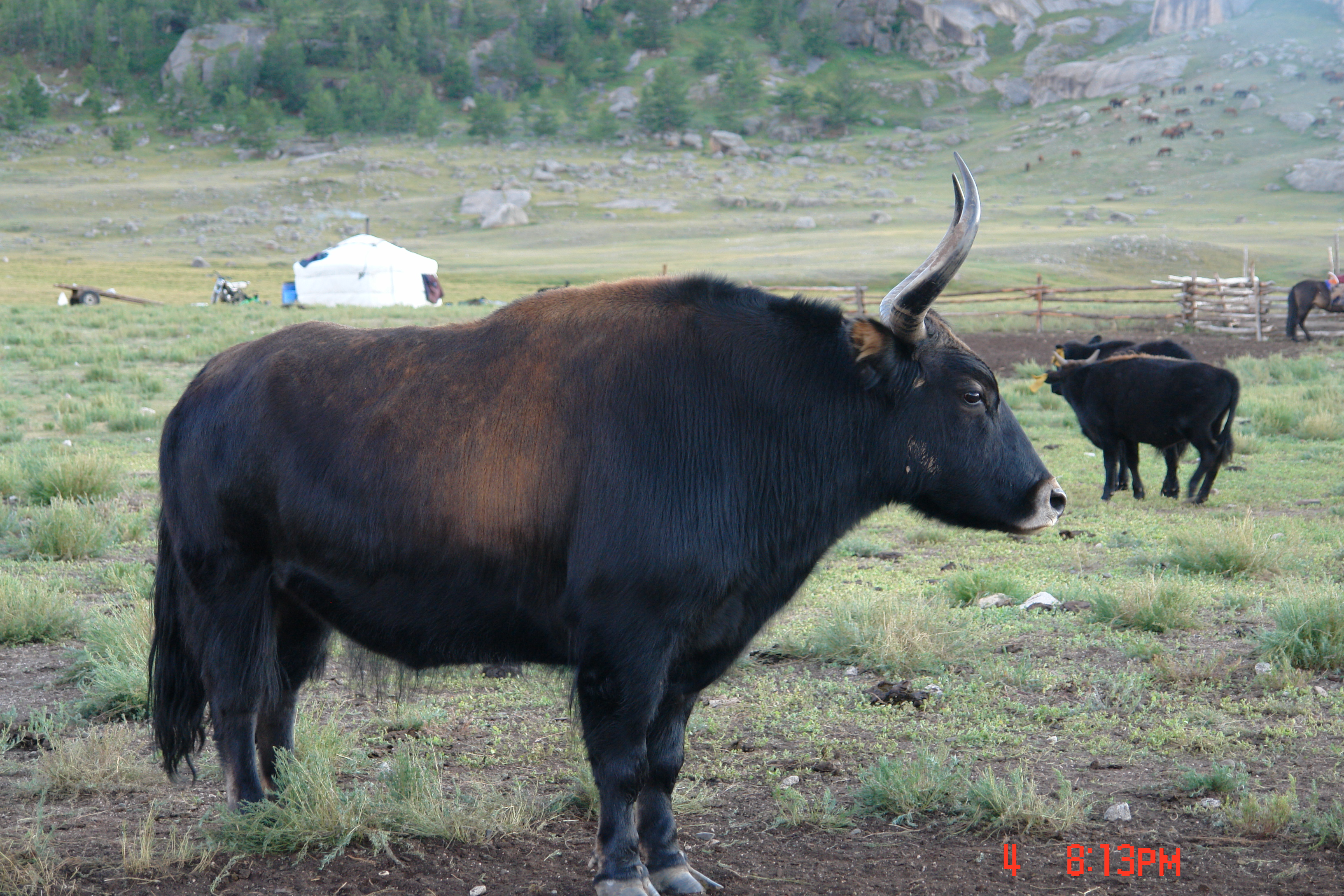 Монгол: Нас бие гүйцсэн хайнагийн үхэр